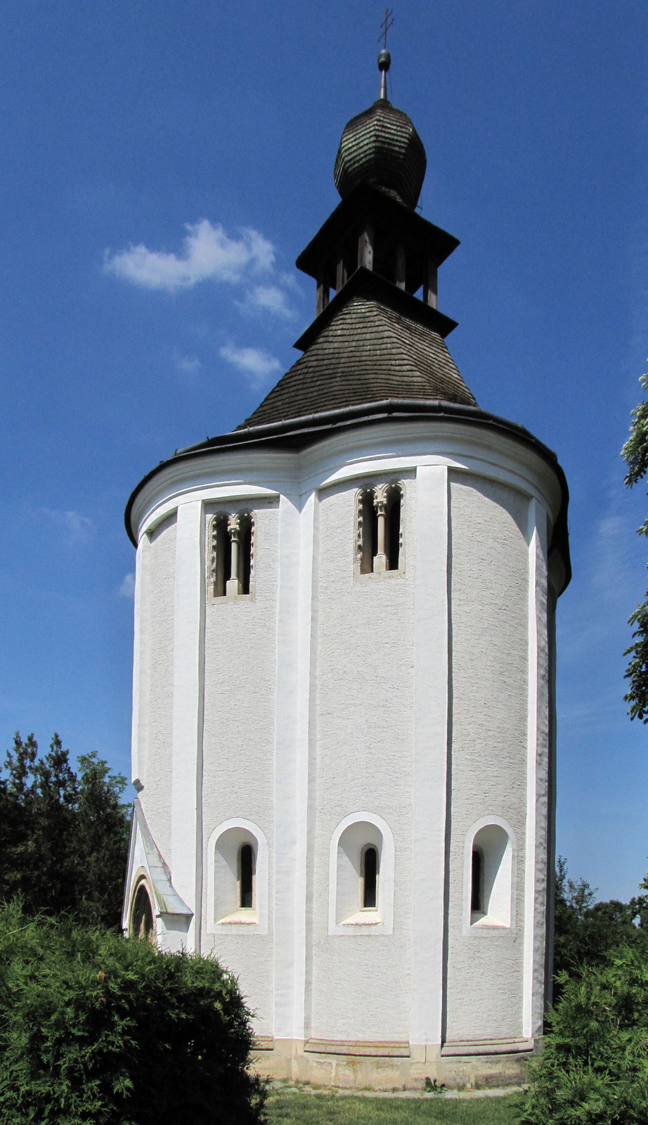 Szt. Jakab-kápolna (Ják, Szabadnép u.) This is a photo of a monument in Hungary. Identifier: 14886